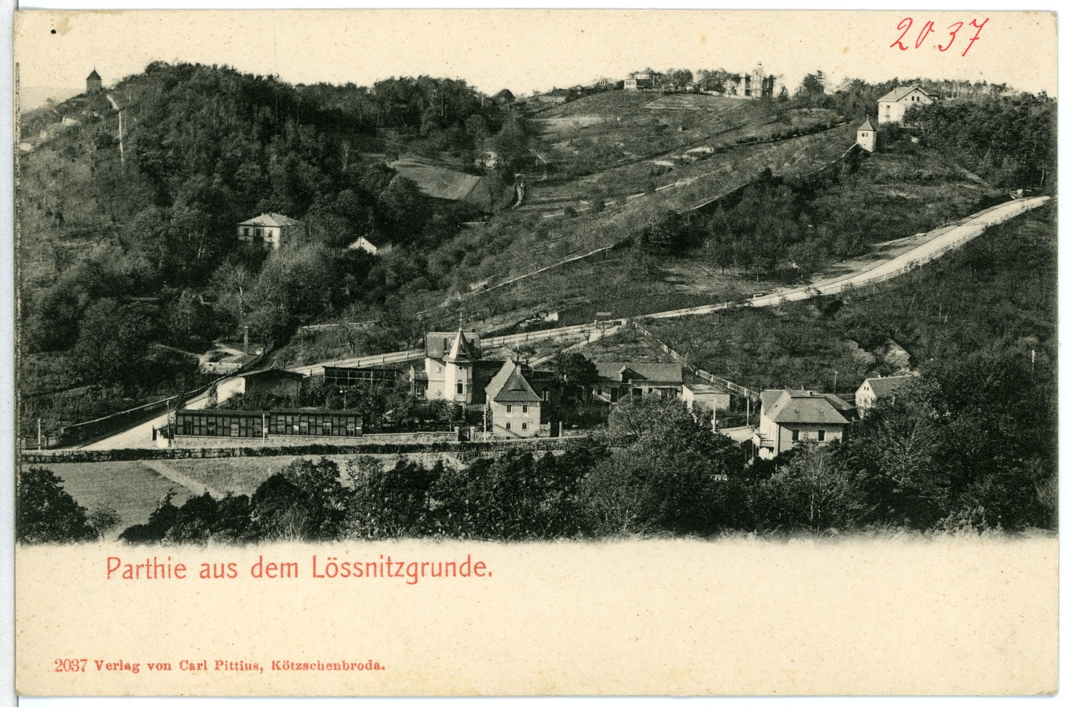 Lößnitzgrund; Partie This postcard is from publisher Brück & Sohn in Meißen ( postcard has a unique number 02037 and is available in a higher resolution at the publisher. This images was uploaded in a cooperation project between Wikipedians and the publisher.